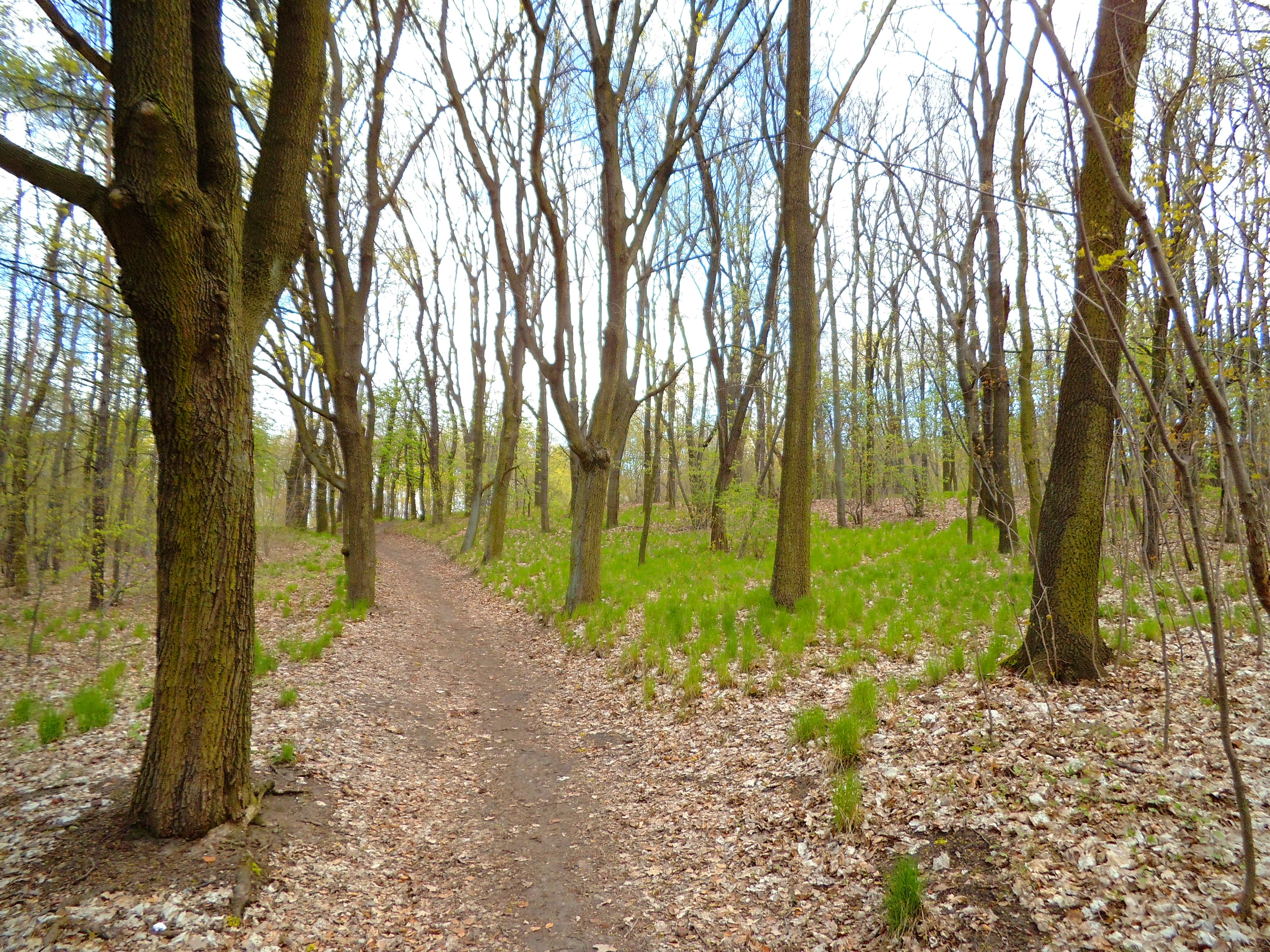 Park na Bielanach w Toruniu